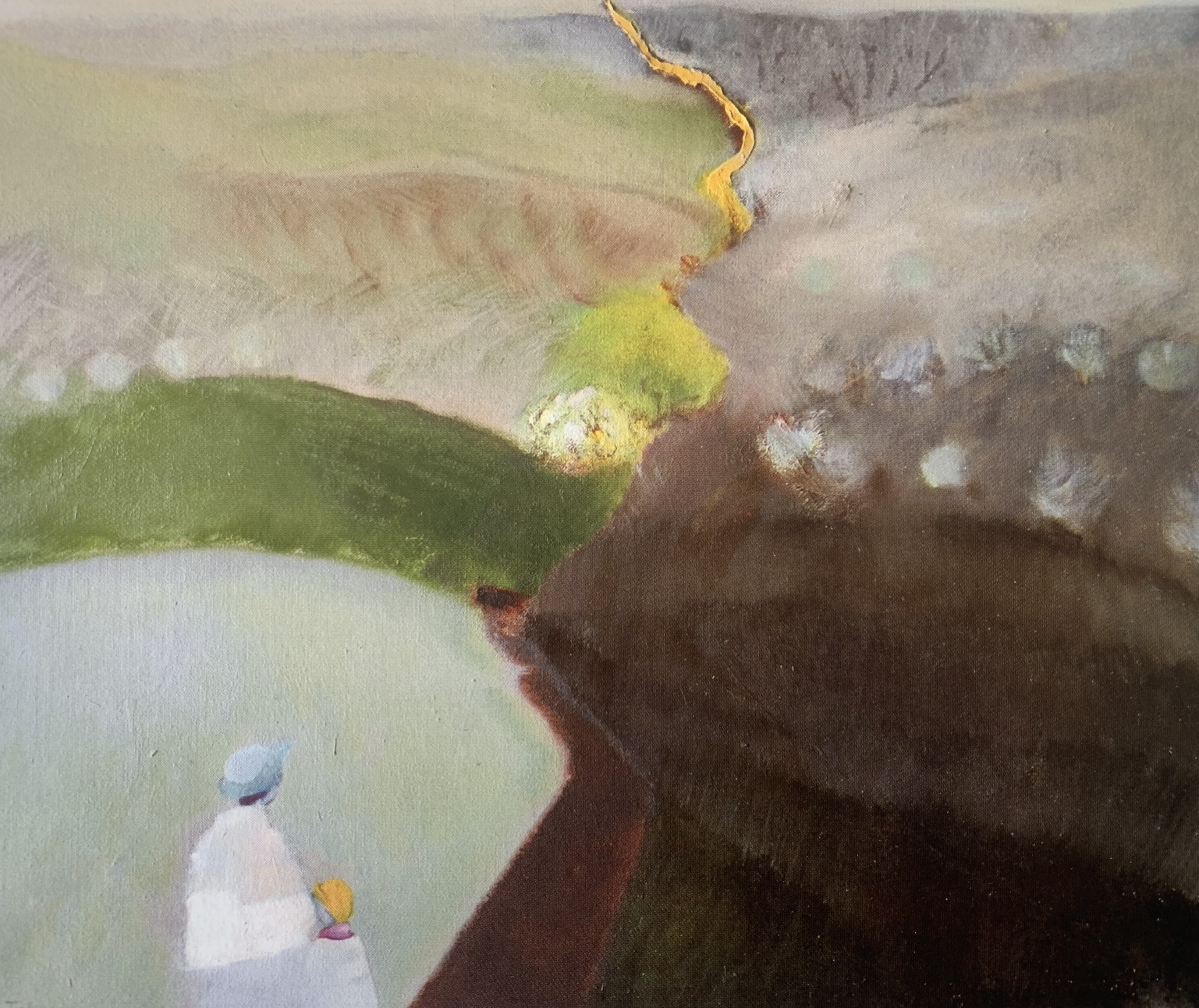 Confine